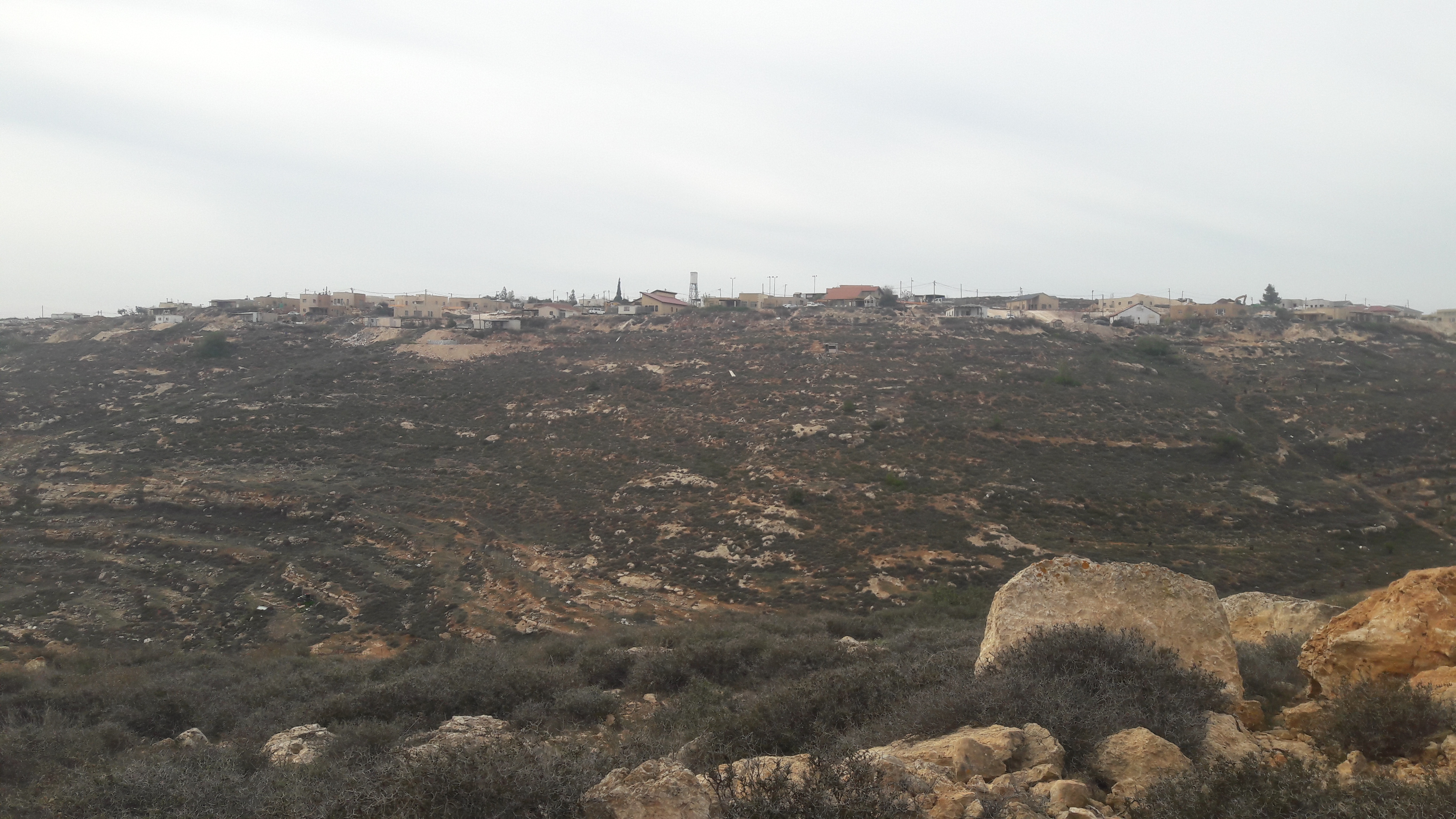 המאחז קידה